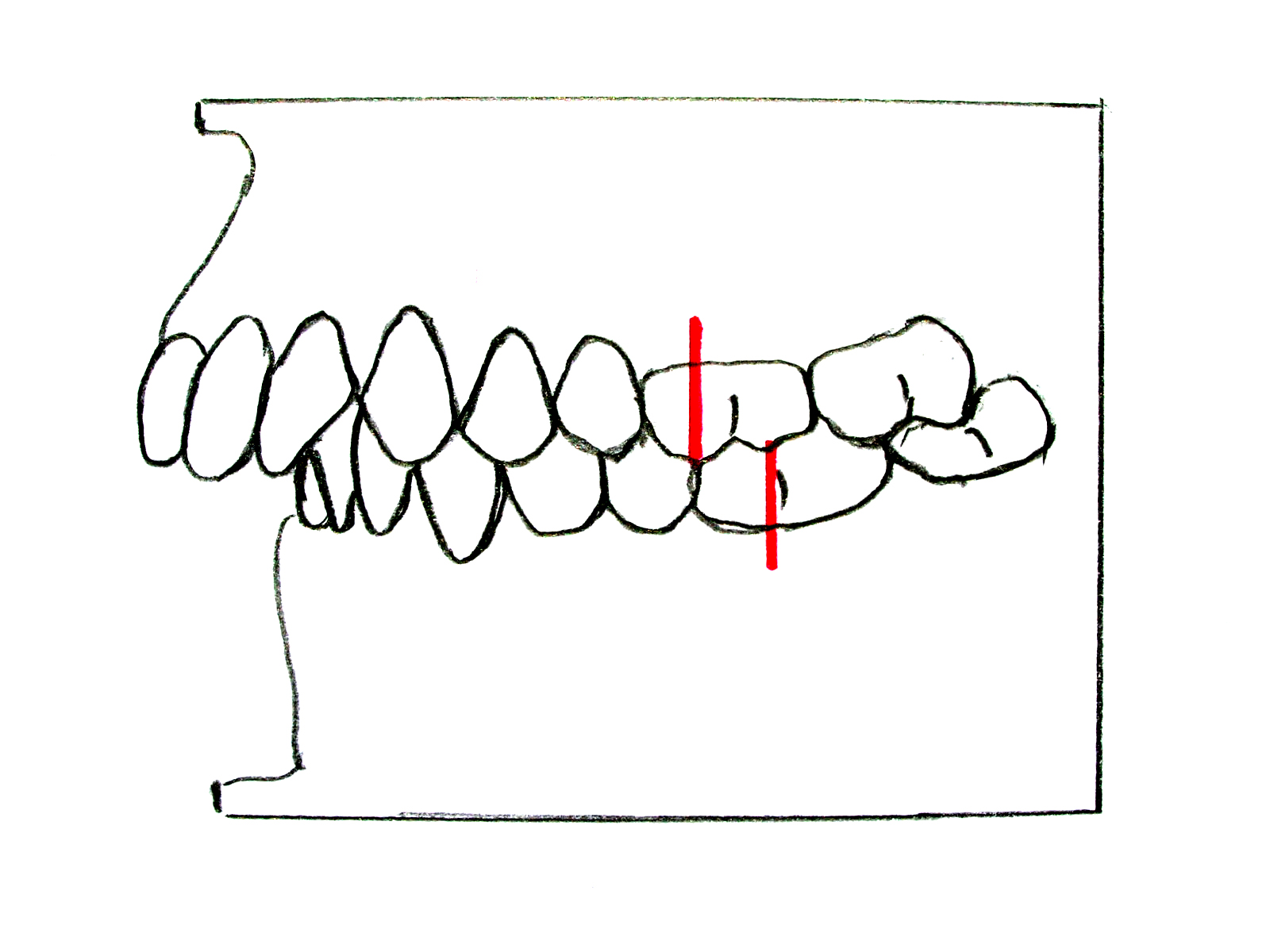 Zahnfehlstellung nach Angle Klasse II/1